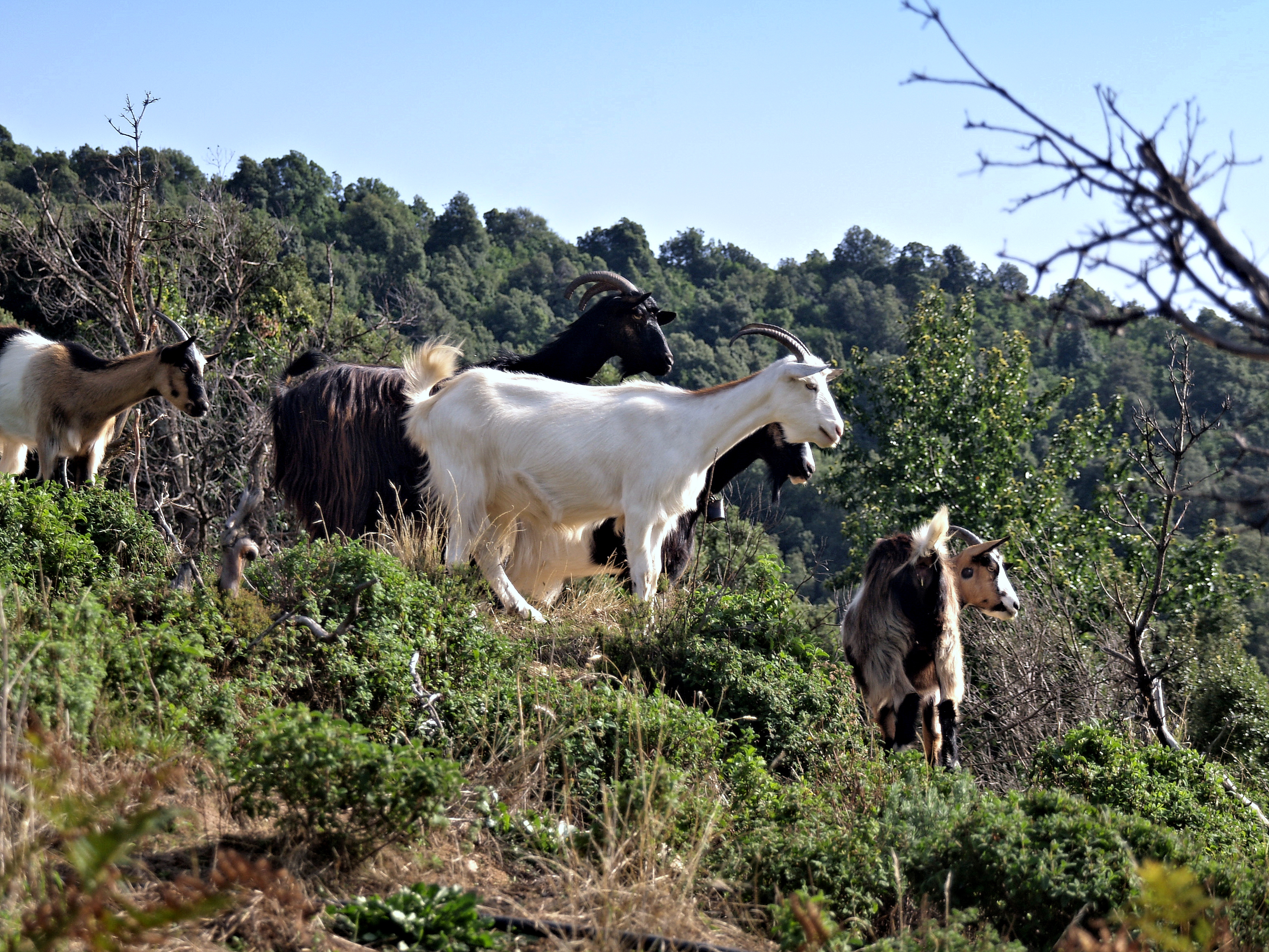 Murzo, Ouest Corse (Corse) - Troupeau de chèvres